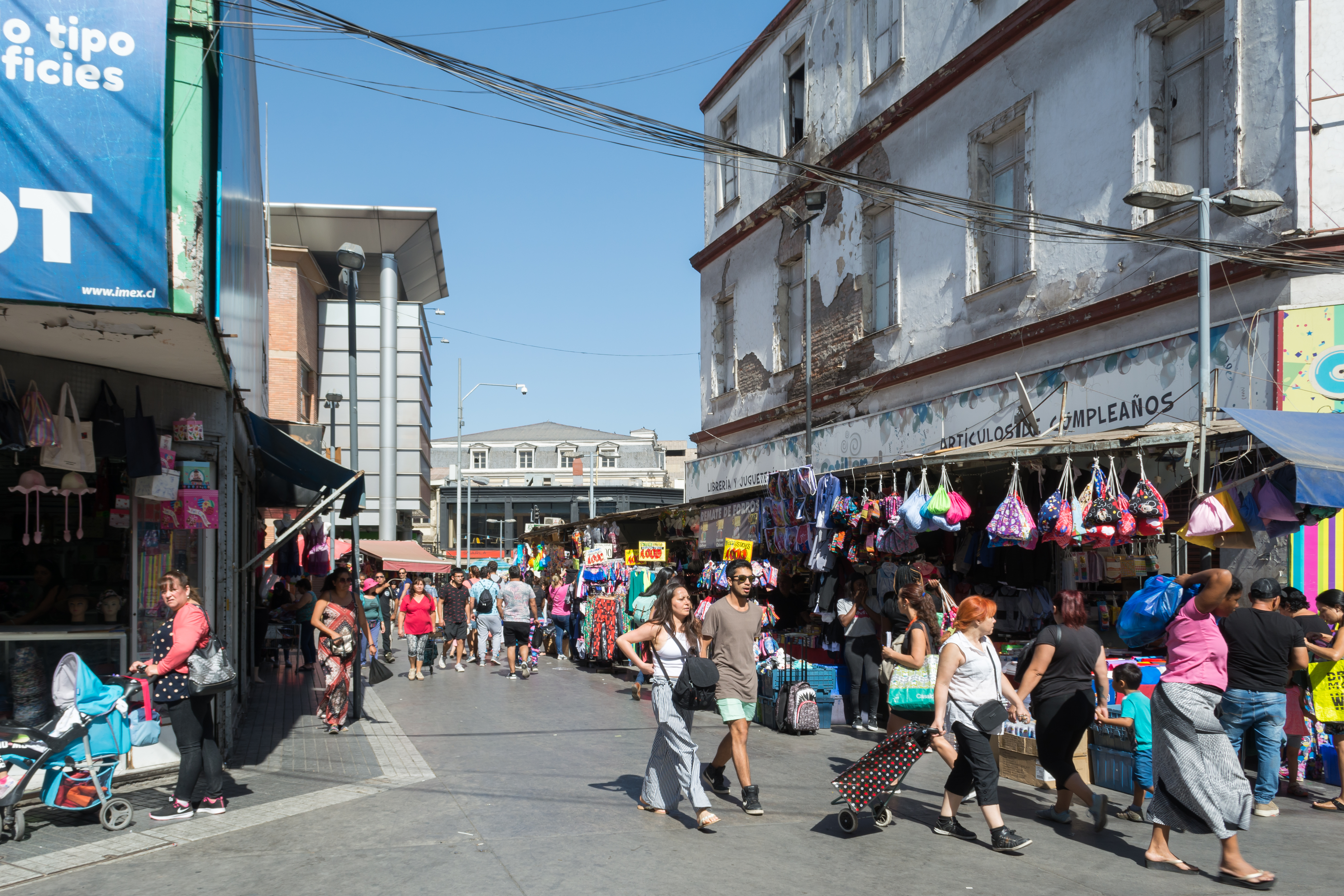 Campbell con Meiggs, Barrio Meiggs, Santiago, Región Metropolitana, Chile